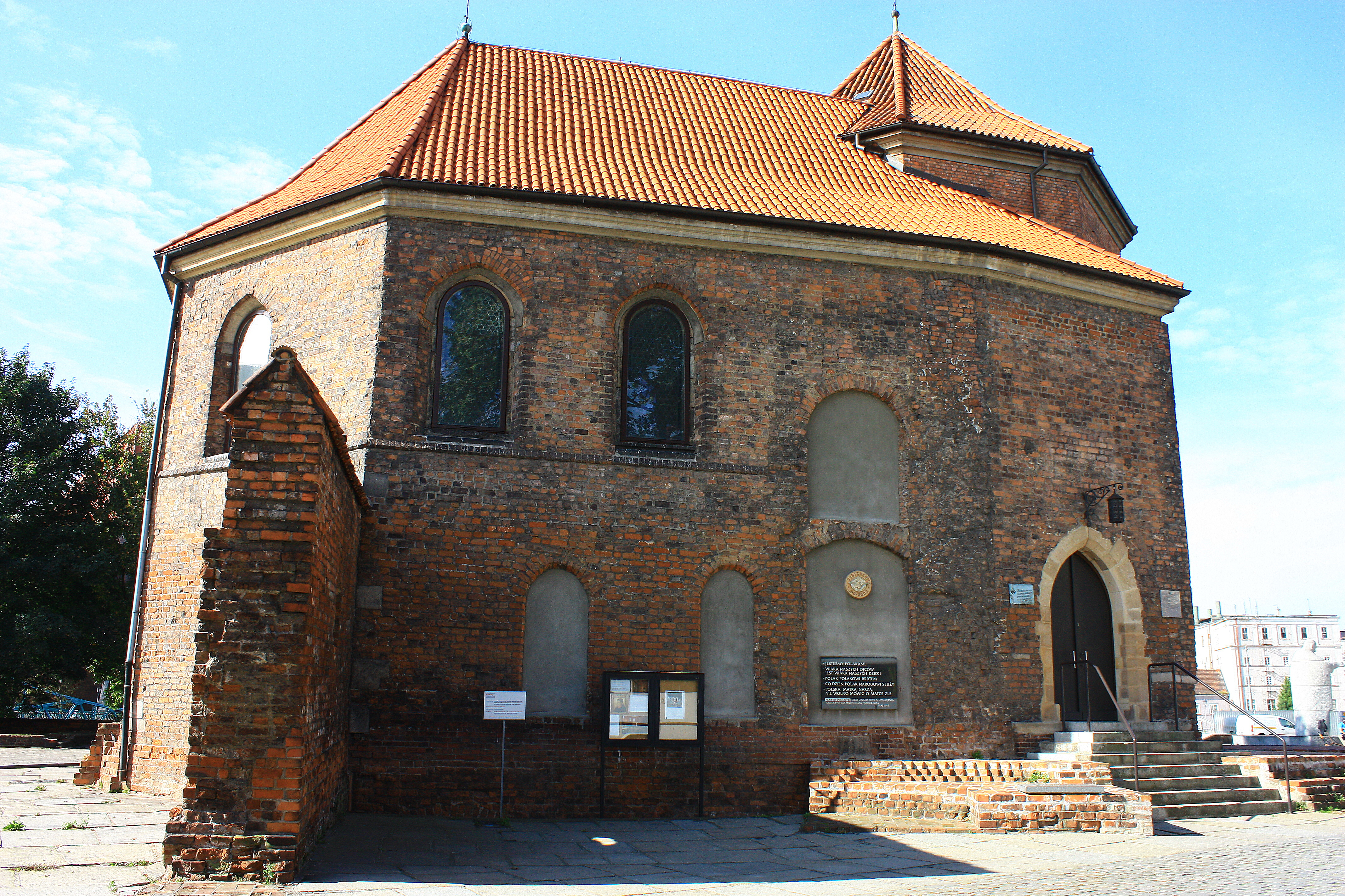 Wrocław, kościół p.w. św. Marcina, XIII, 1958-1968